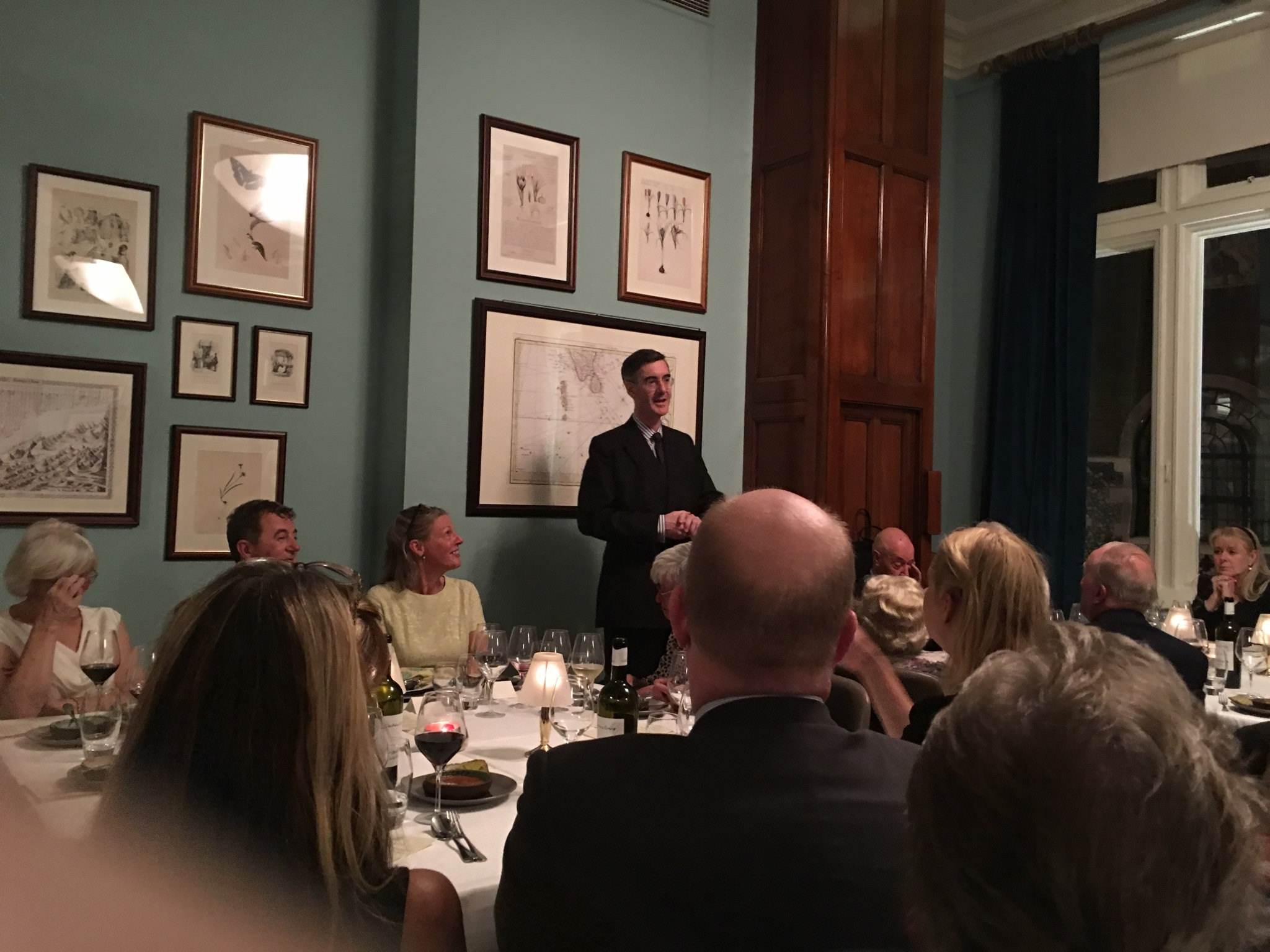 Rees-Mogg in 2016 at a gala dinner